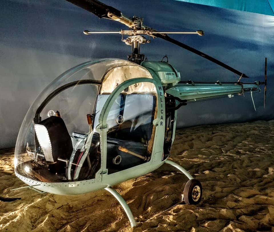 Elicottero Agusta A 104 helicar.